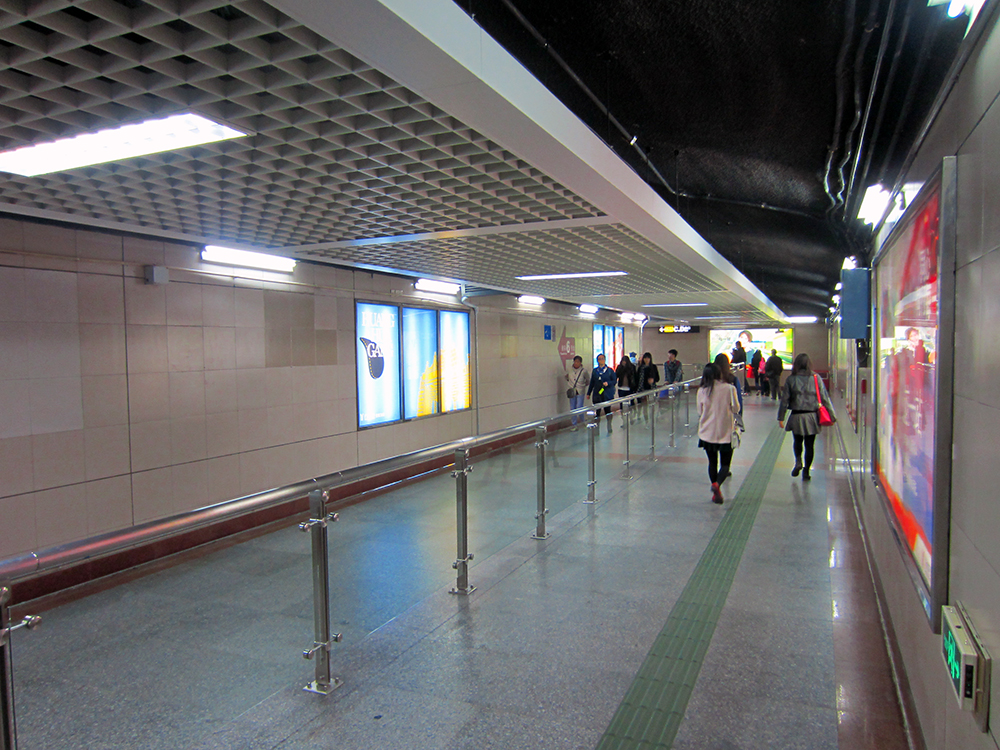 東山口站換乘通道（6號線一端）